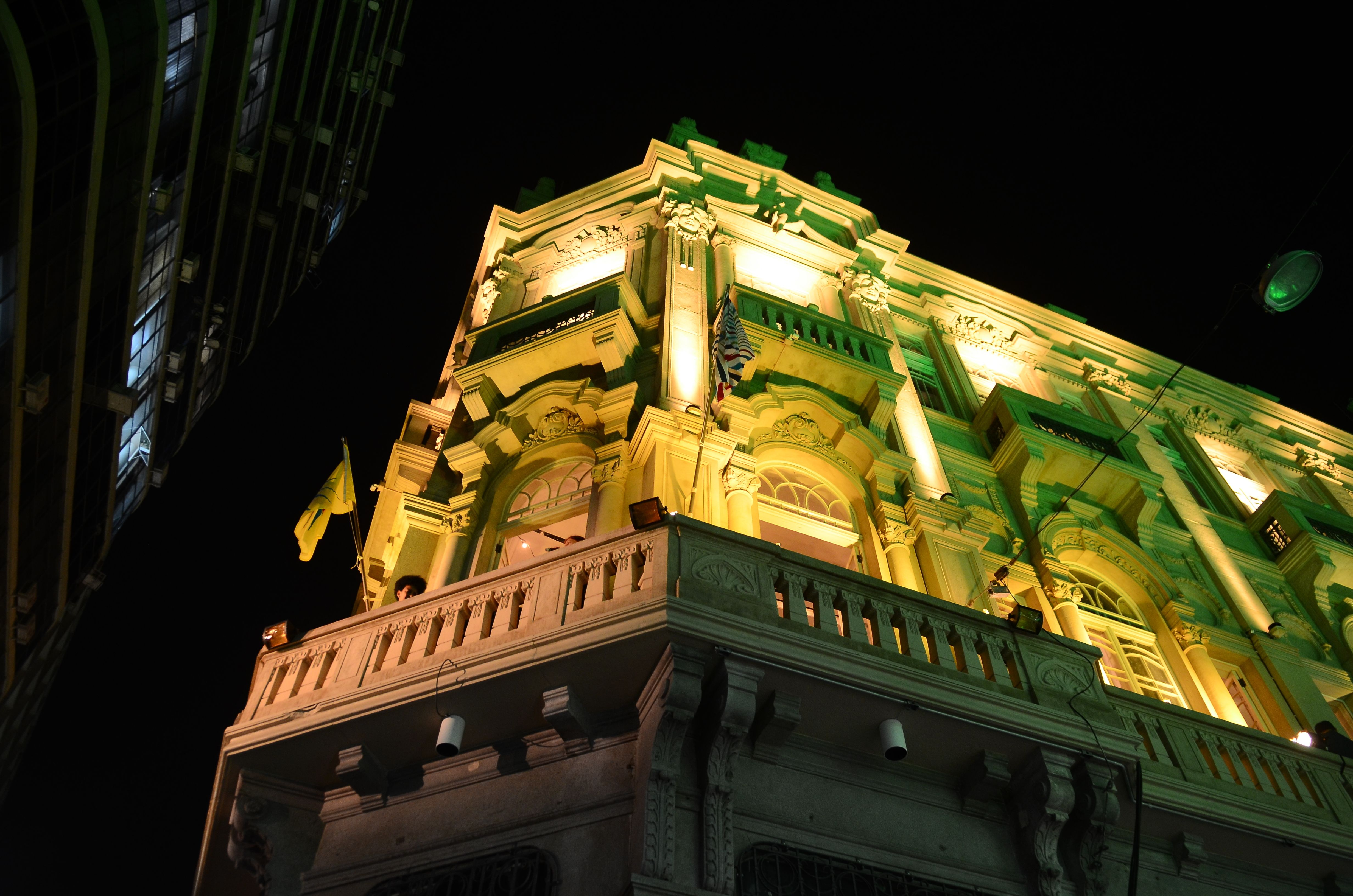 São Paulo - Os shows do Palacete Tereza Toledo Lara acontecem na varanda, durante o Viradão Cultural Paulista 2016